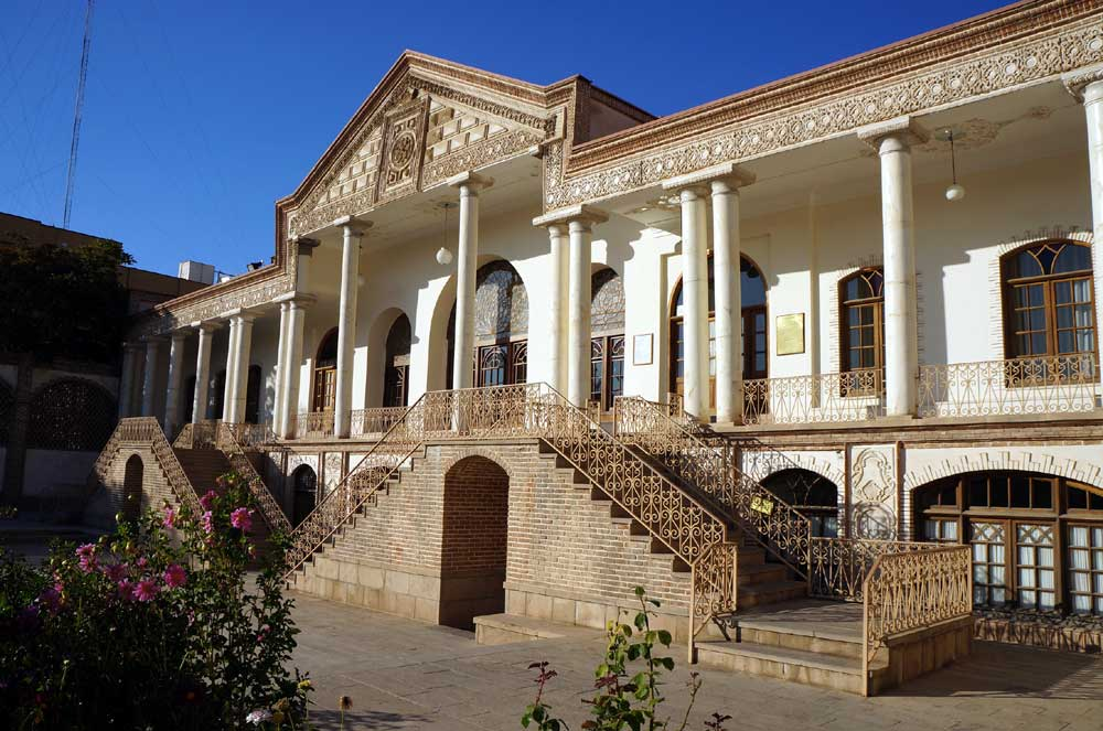 Tabriz, Iran